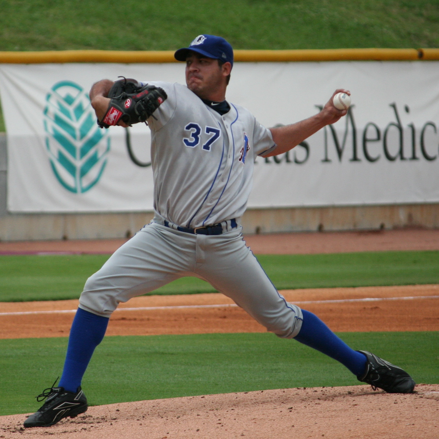 Carlos Hernández